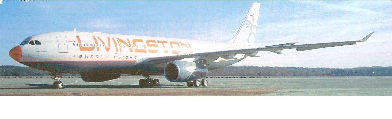 A330 di Livingston